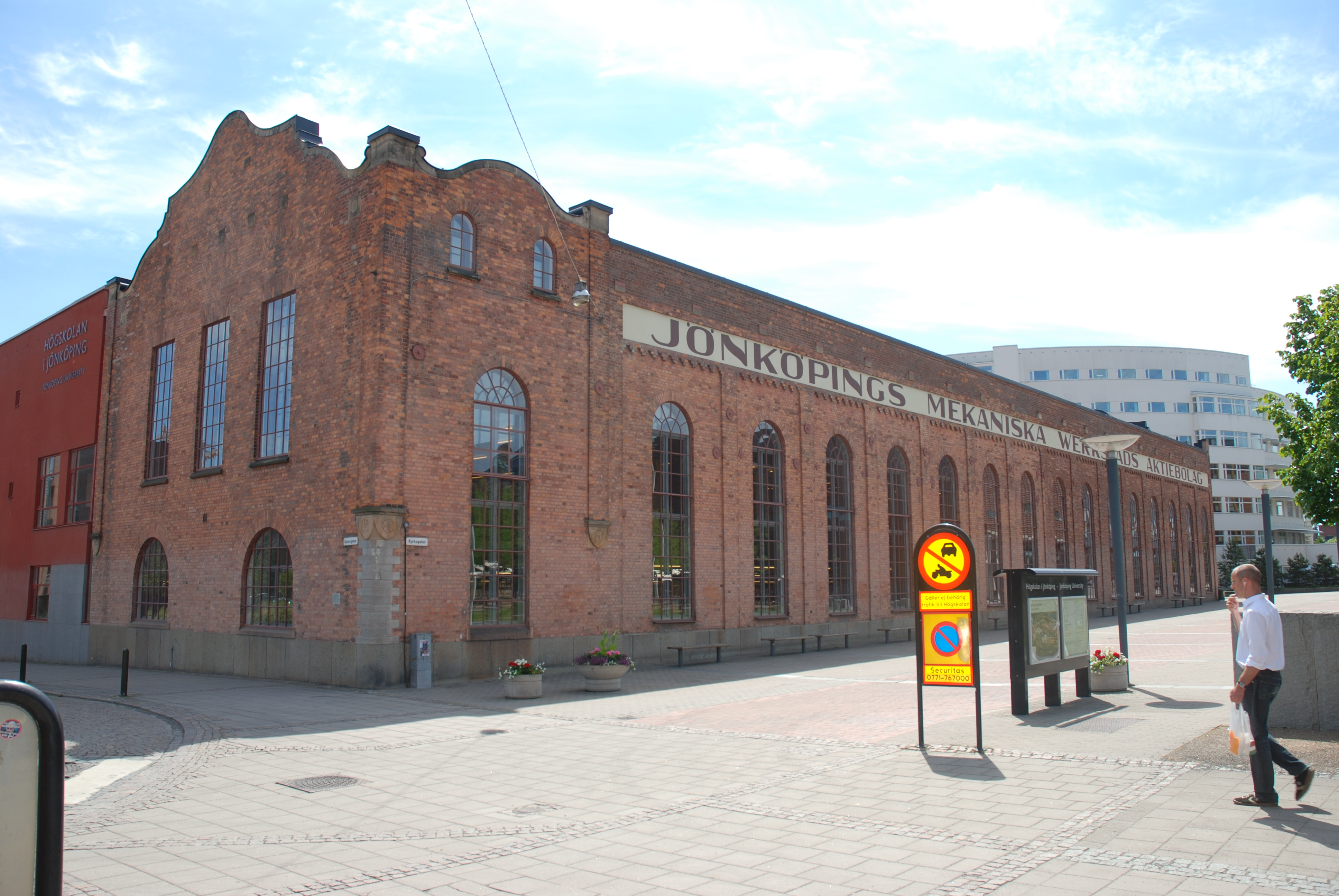 Foundry Building, Jönköpings Mekaniska Werkstad, Jönköping, Sweden. Architect: Magnus Steendorff.